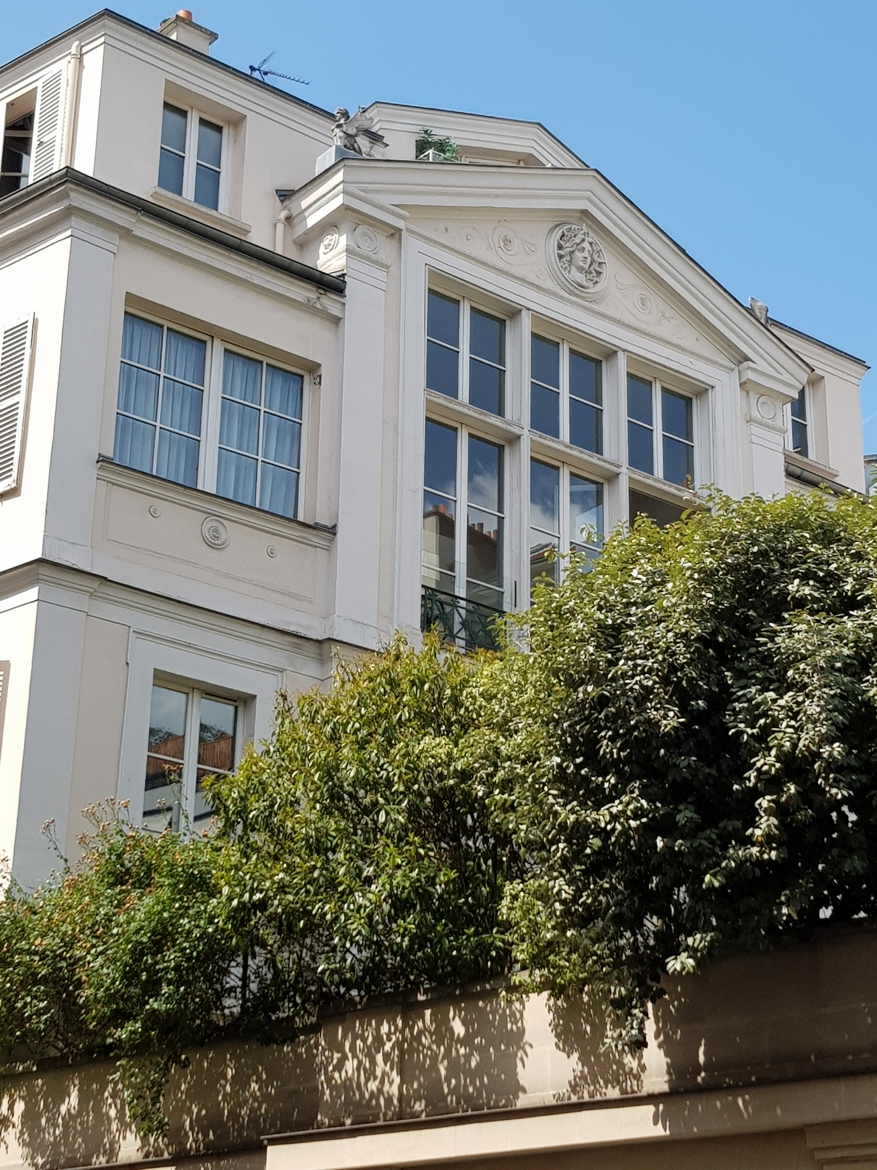 Maison située à l'angle des rues Bréa et Vavin, Paris 6e.